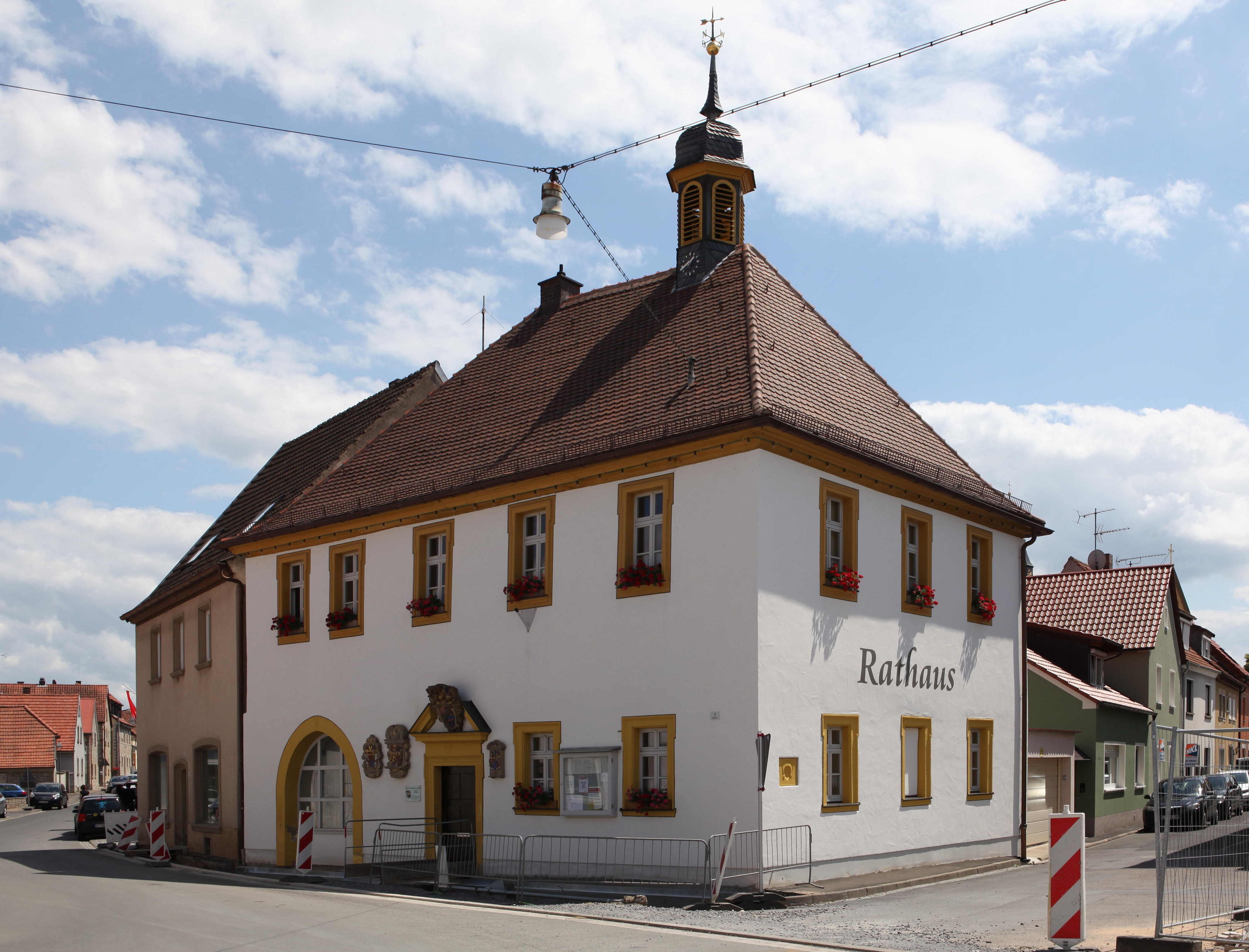 Rathaus in Schwarzach am Main, Bayern